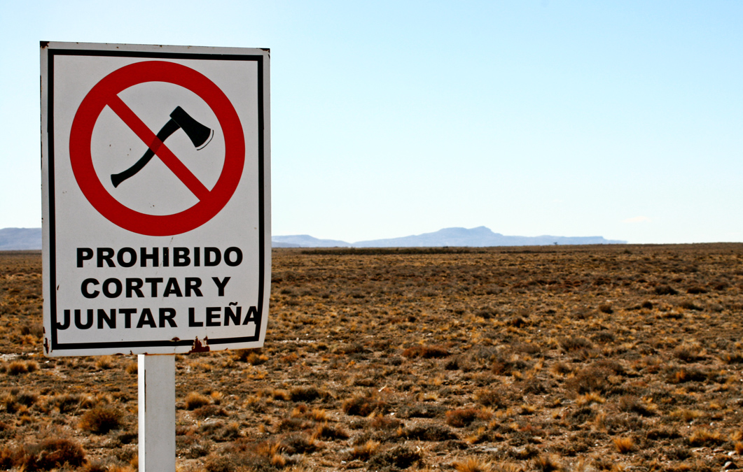 Prohibido cortar leña, Cañadon Vasco, Santa Cruz, Argentina